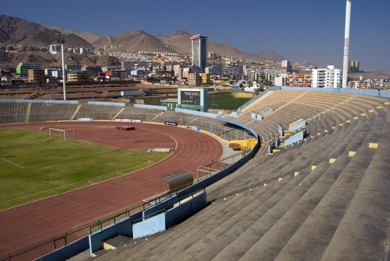 Estadio Regional